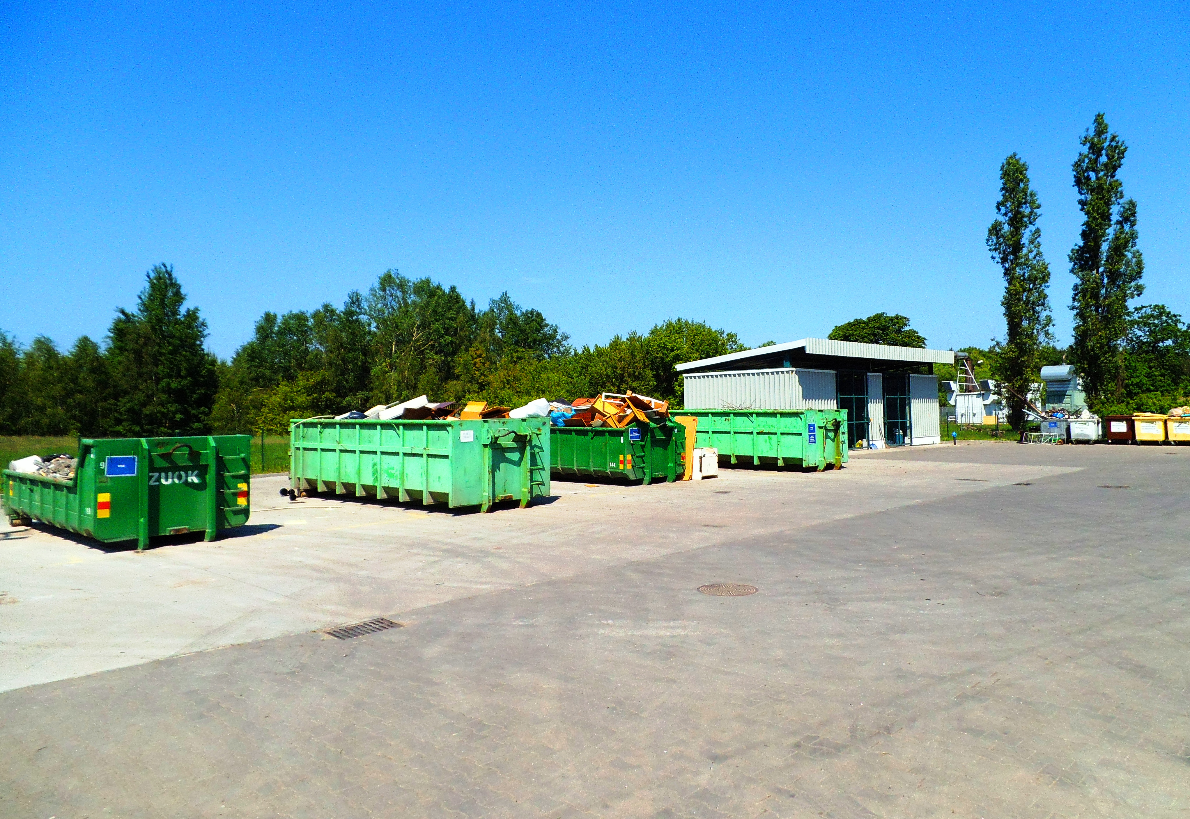 PSZOK w Toruniu